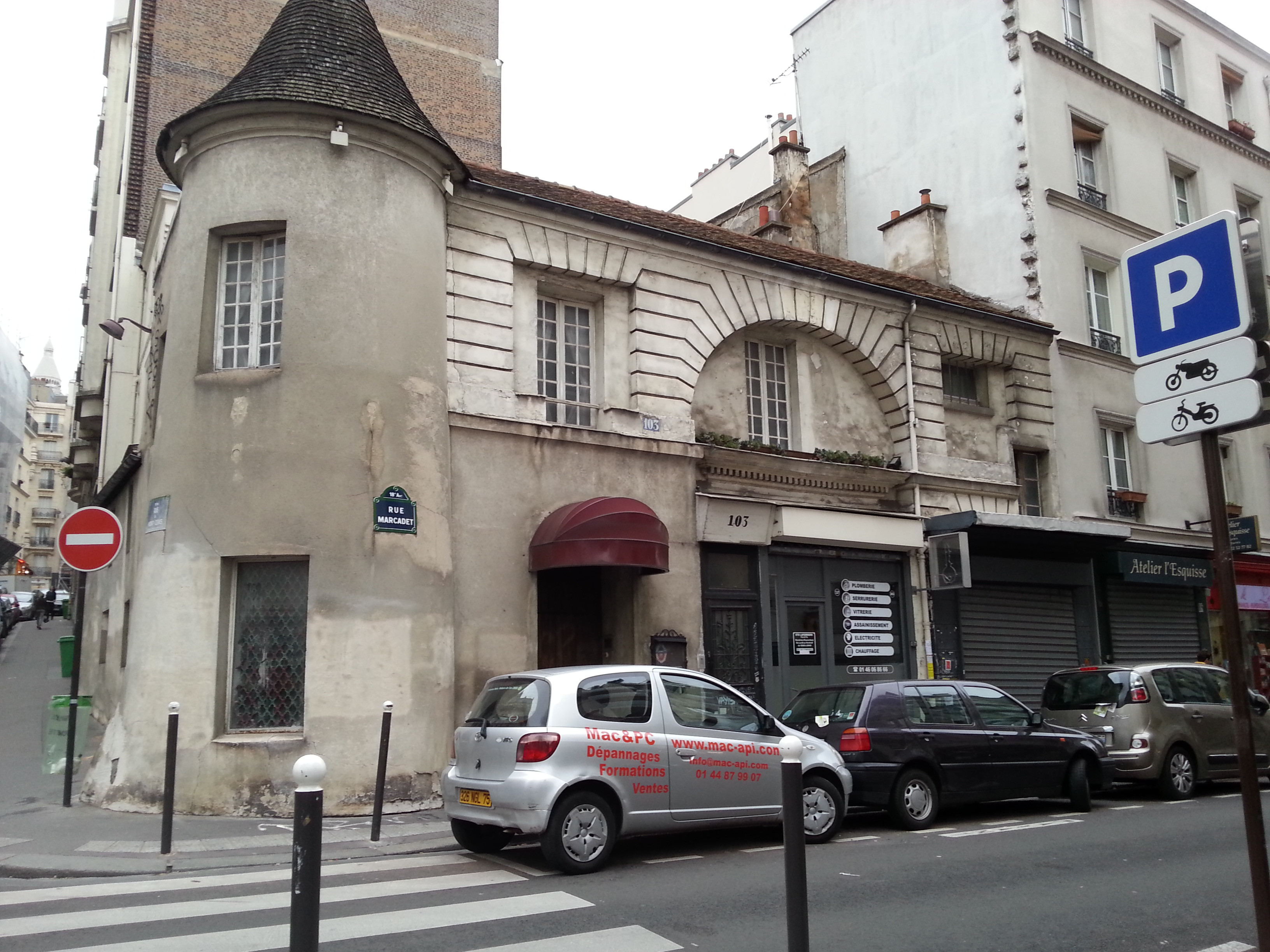 Manufacture de porcelaine de Clignancourt .